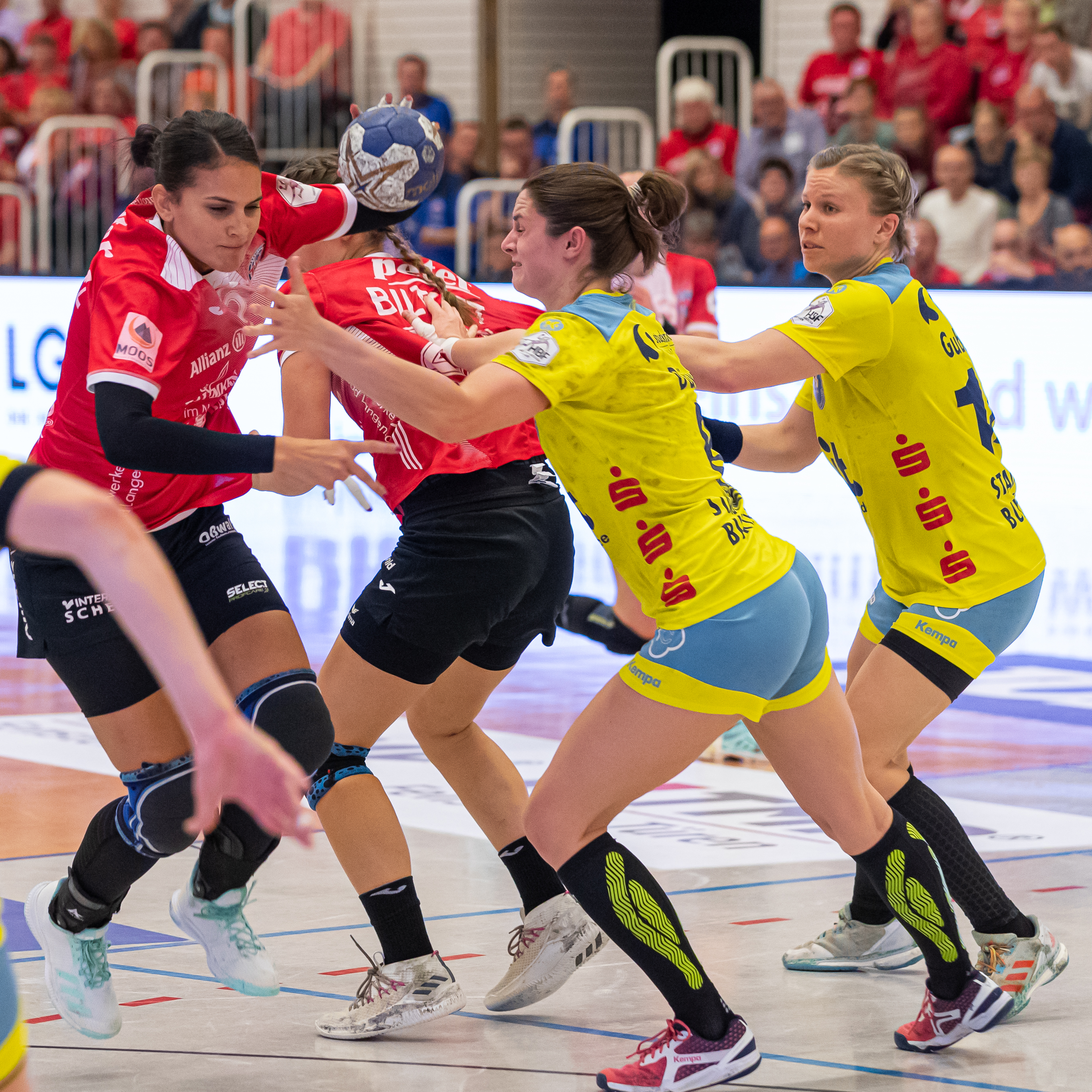 Handball, 1. Bundesliga Frauen, Thüringer HC - Buxtehuder SV; v.li.: Almudena Rodríguez (Thüringer HC, 6), Mia Biltoft (Thüringer HC, 22), Mieke Düvel (Buxtehude, 8), Friederike Gubernatis (Buxtehude, 14); Aktion, action